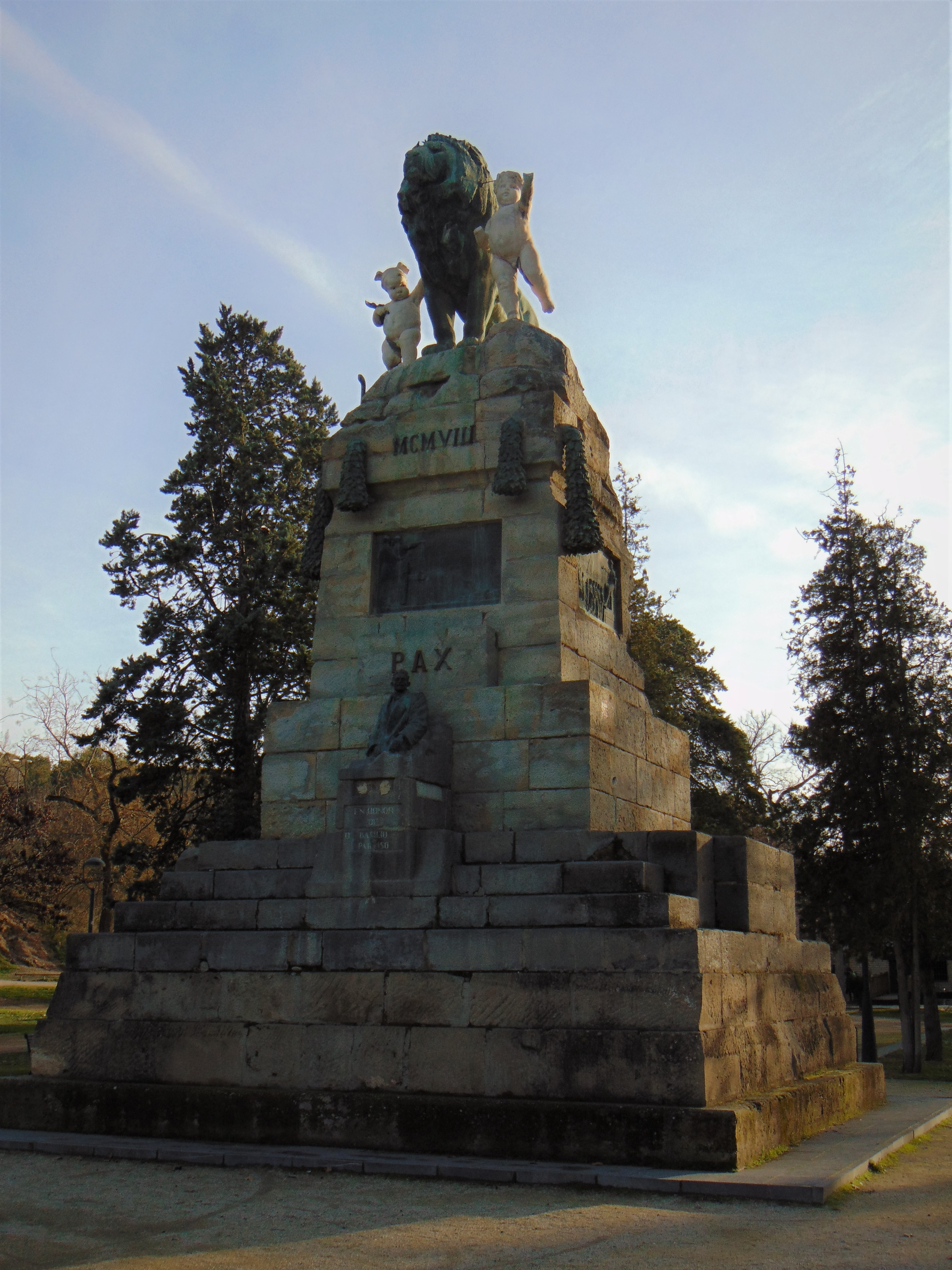 Reseña del monumento realizado por Miguel Oslé